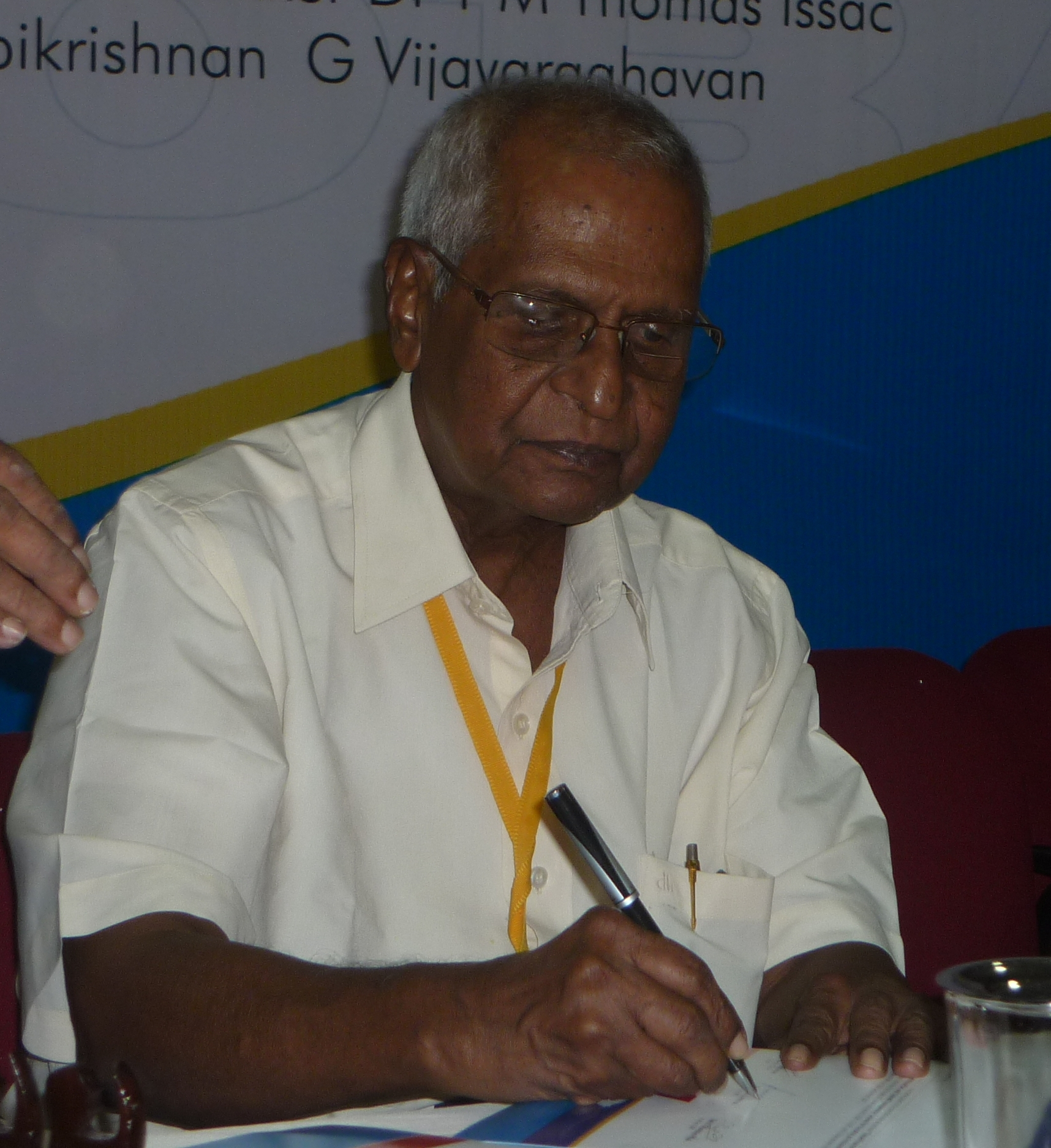 കോരളത്തിലെ പ്രമുഖ ട്രേഡ് യൂണിയൻ നേതാവാണ് സി.പി.ഐ(എം) അംഗമായ എം.എം. ലോറൻസ്